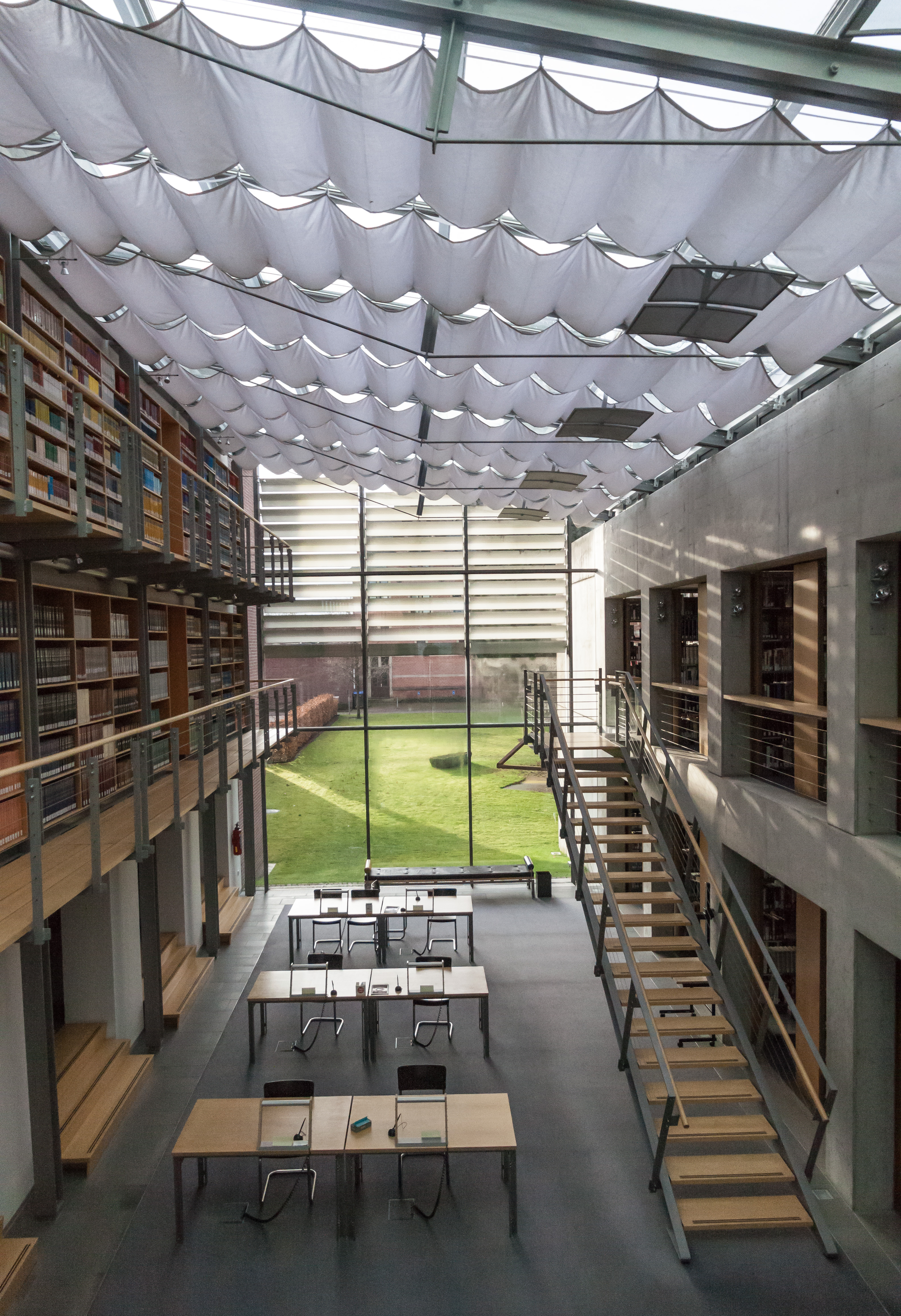 Blick in die Landschaftsbibliothek in Aurich